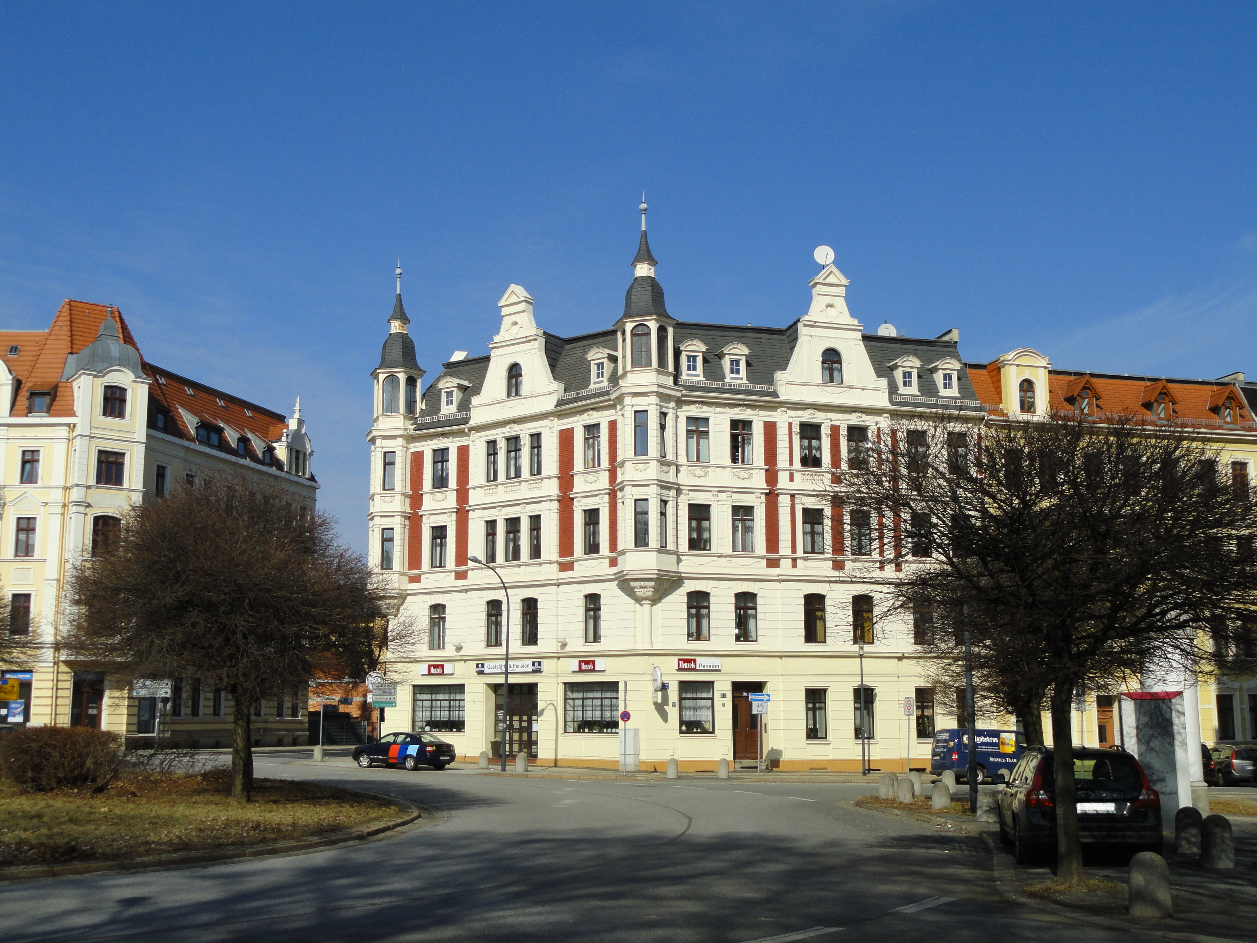 Hotel Drehscheibe am Brautwiesenplatz in Görlitz, Landeskronstraße 26